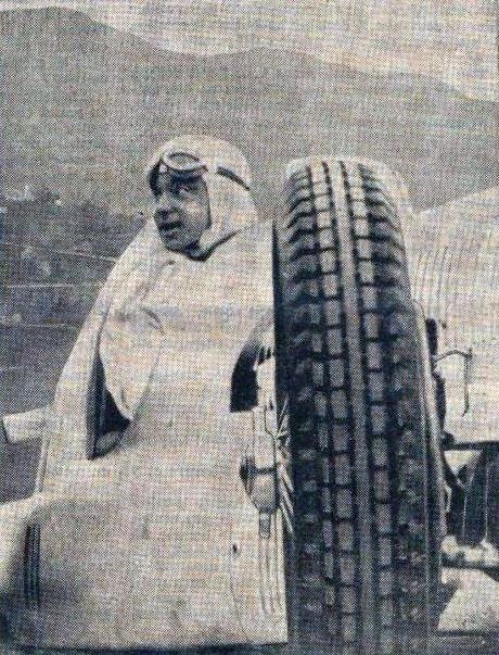 Rudolf Caracciola au Grand Prix de Berne 1937